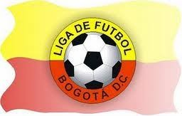 Escudo Liga de bogota